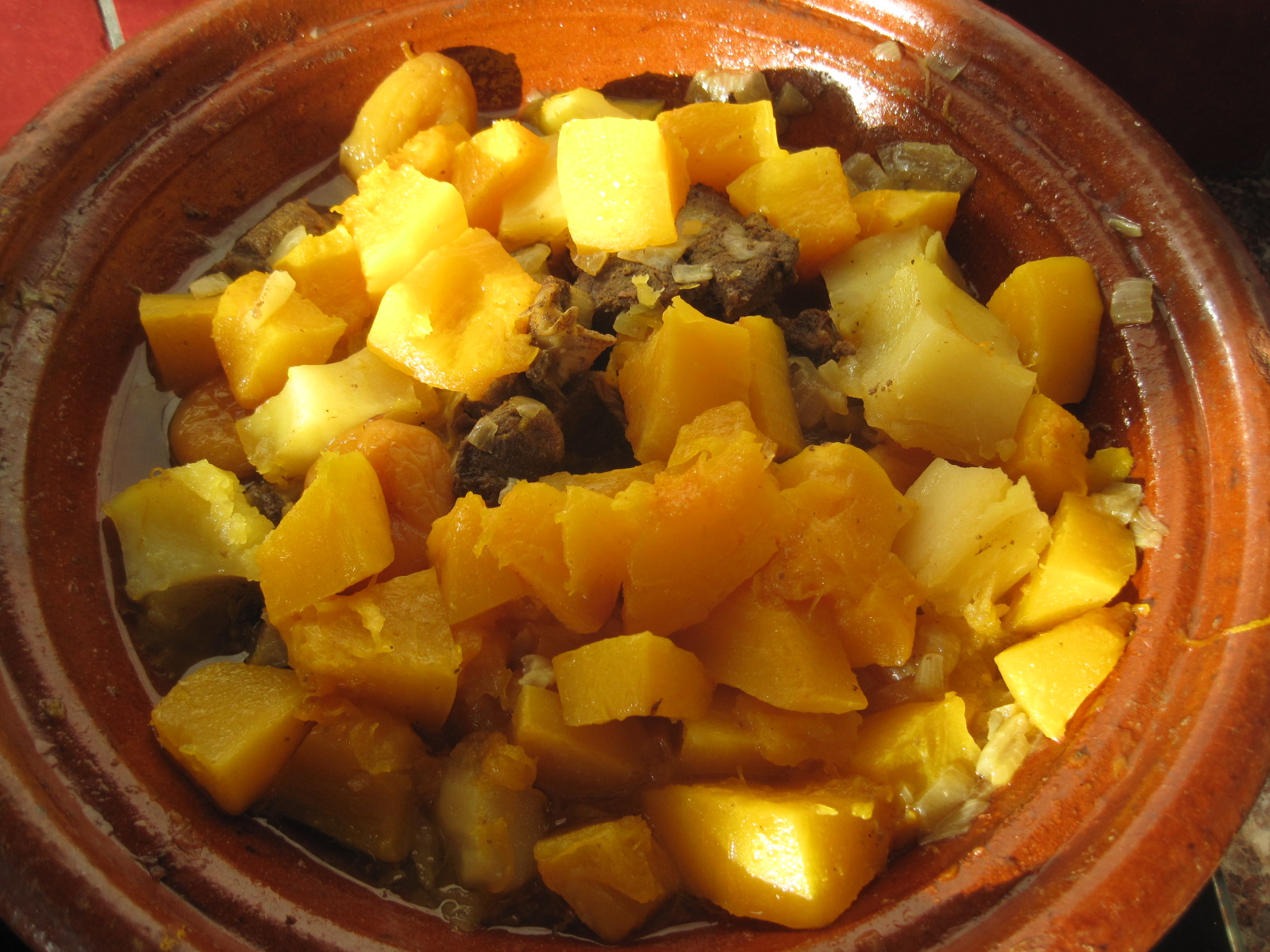 Tajine mangue et agneau